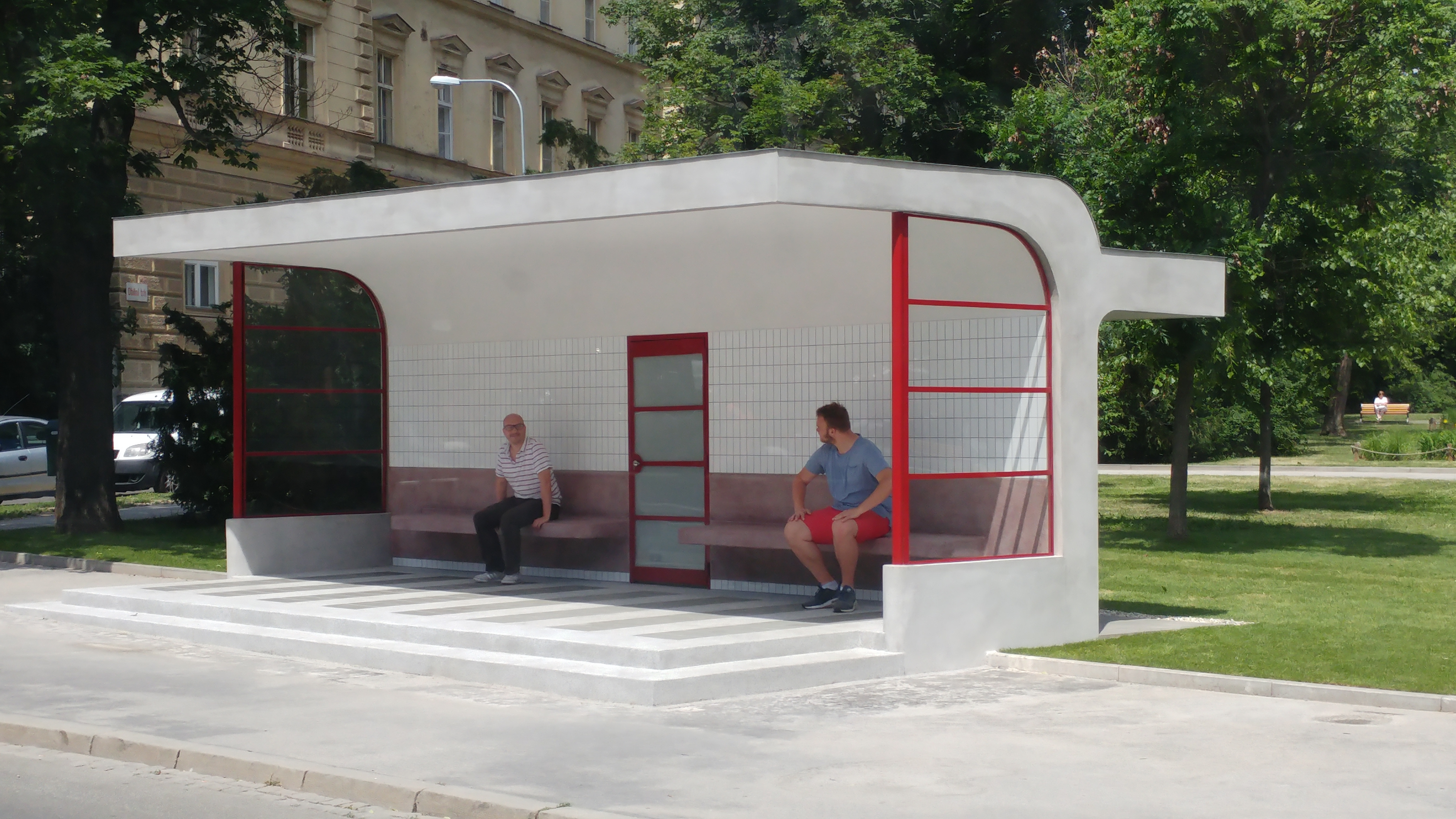 Rekonstruovaná tramvajová zastávka na Obilním trhu v Brně s náhodně zachycenými figuranty iDNES.cz (viz [1])